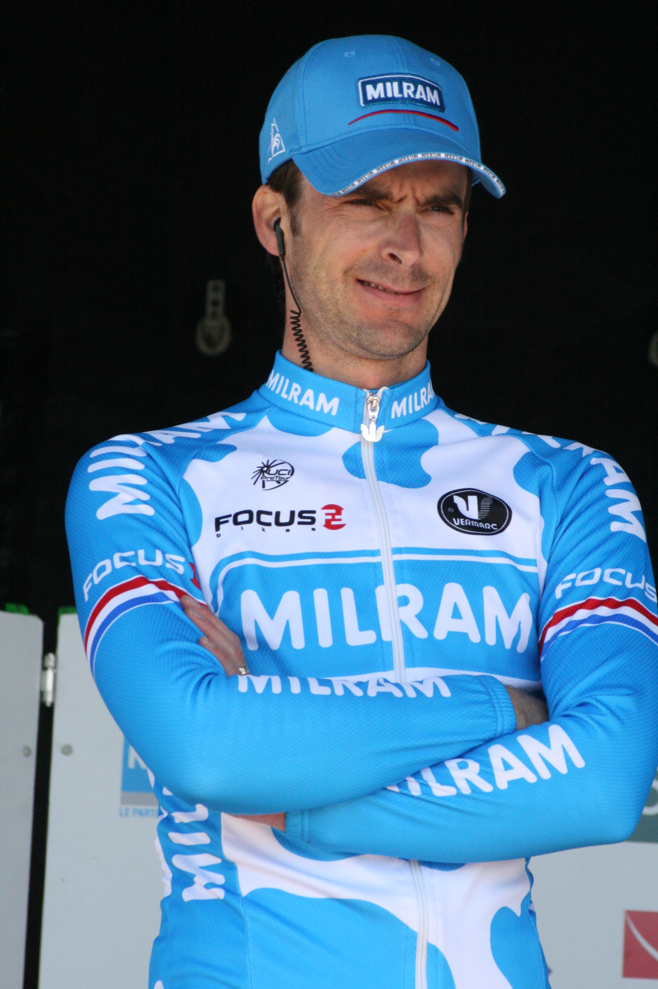 Servais Knaven, lors de la présentation des équipes des 4 jours de Dunkerque 2010